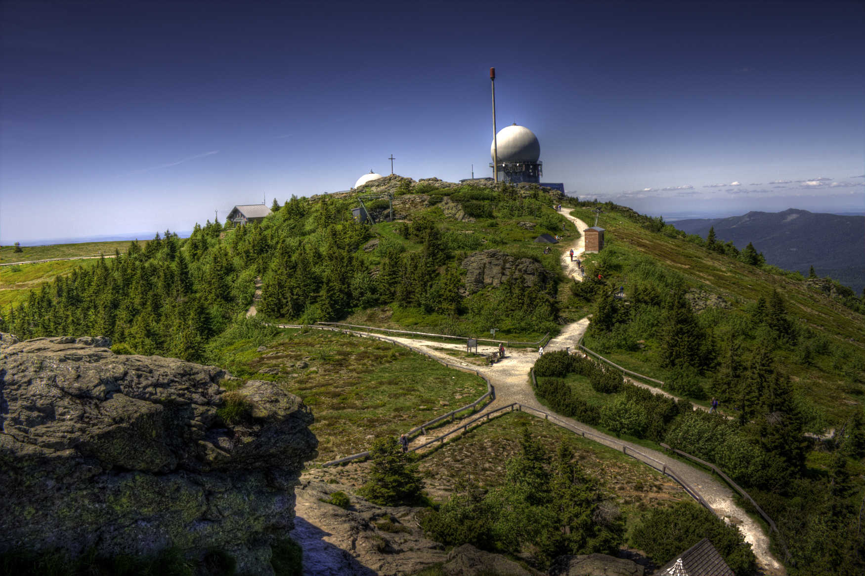 Radom am Großen Arber mit abgesteckten Wanderwegen